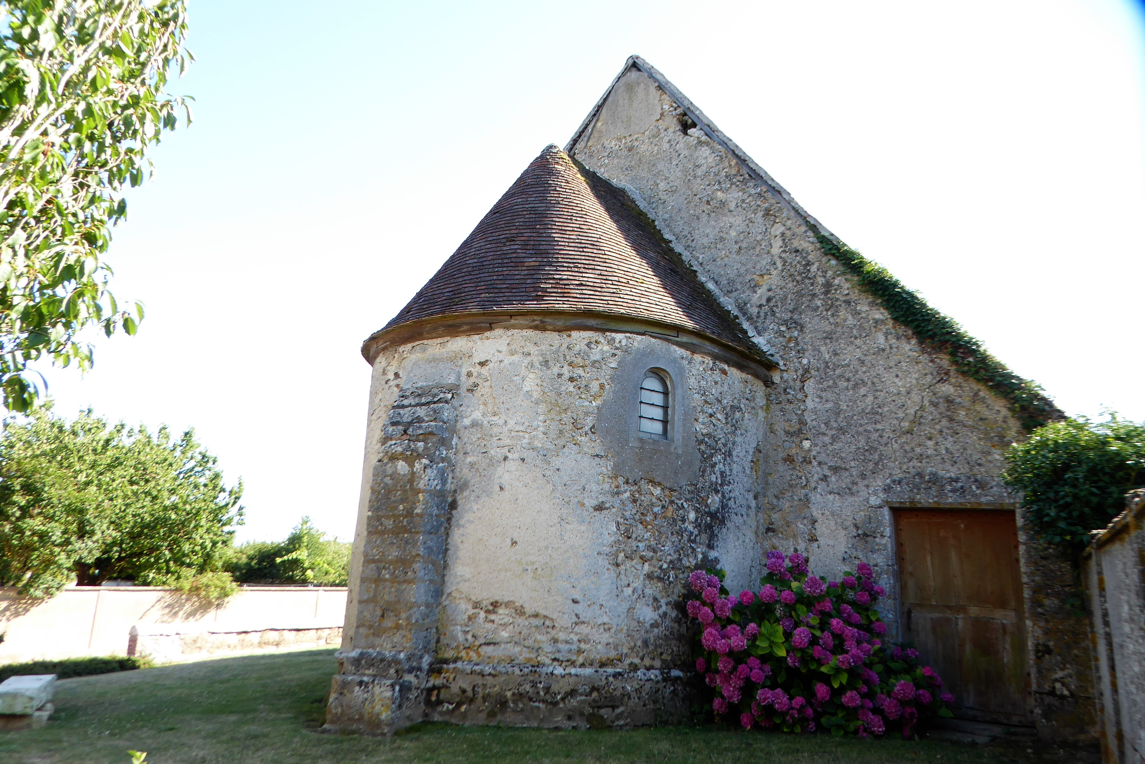 chapelle des Trois-Maries, Mignières, Eure-et-Loir (France). .